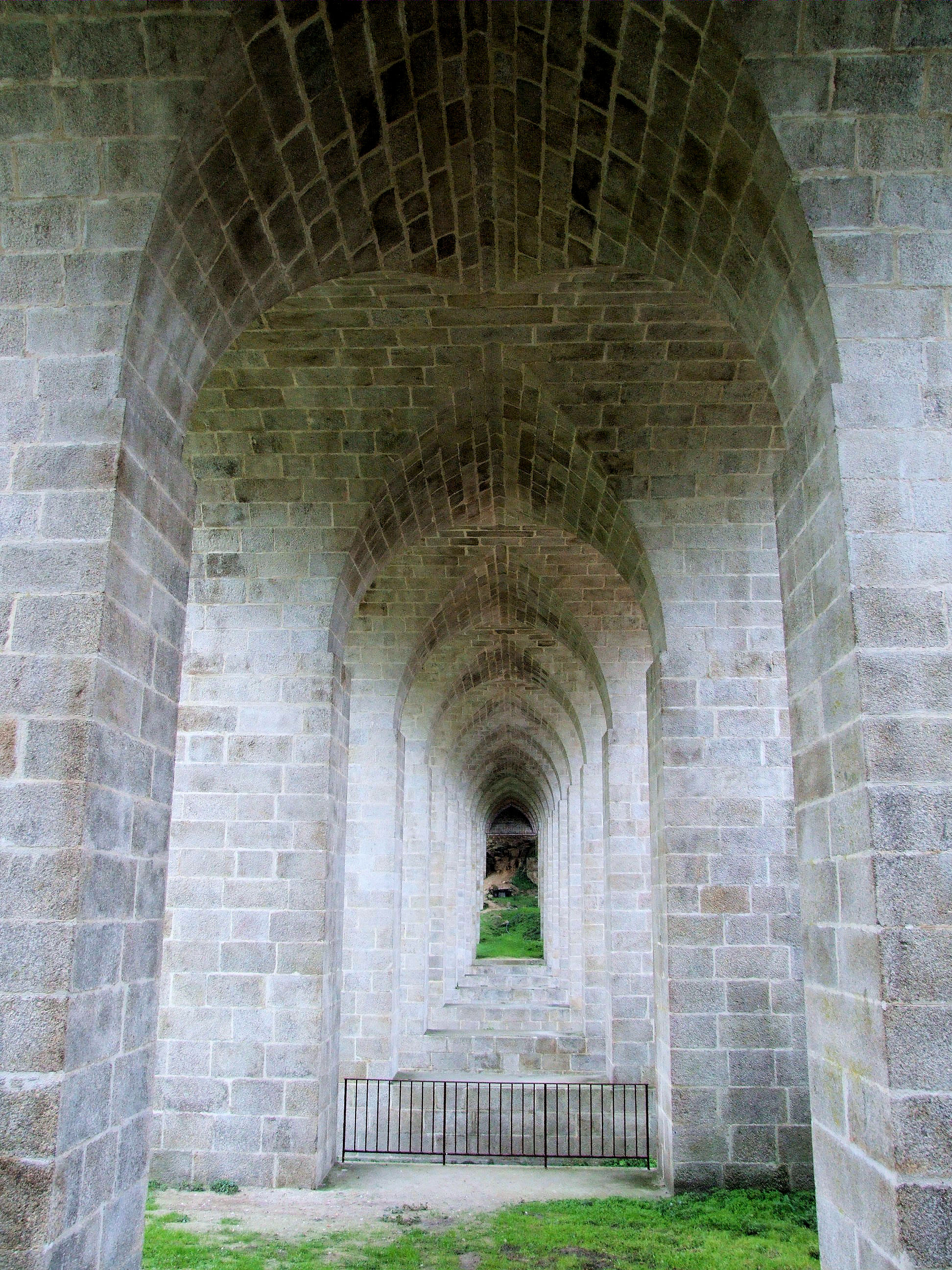 Clisson - Viaduc de Clisson